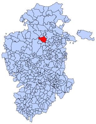 Poza de la Sal en Burgos